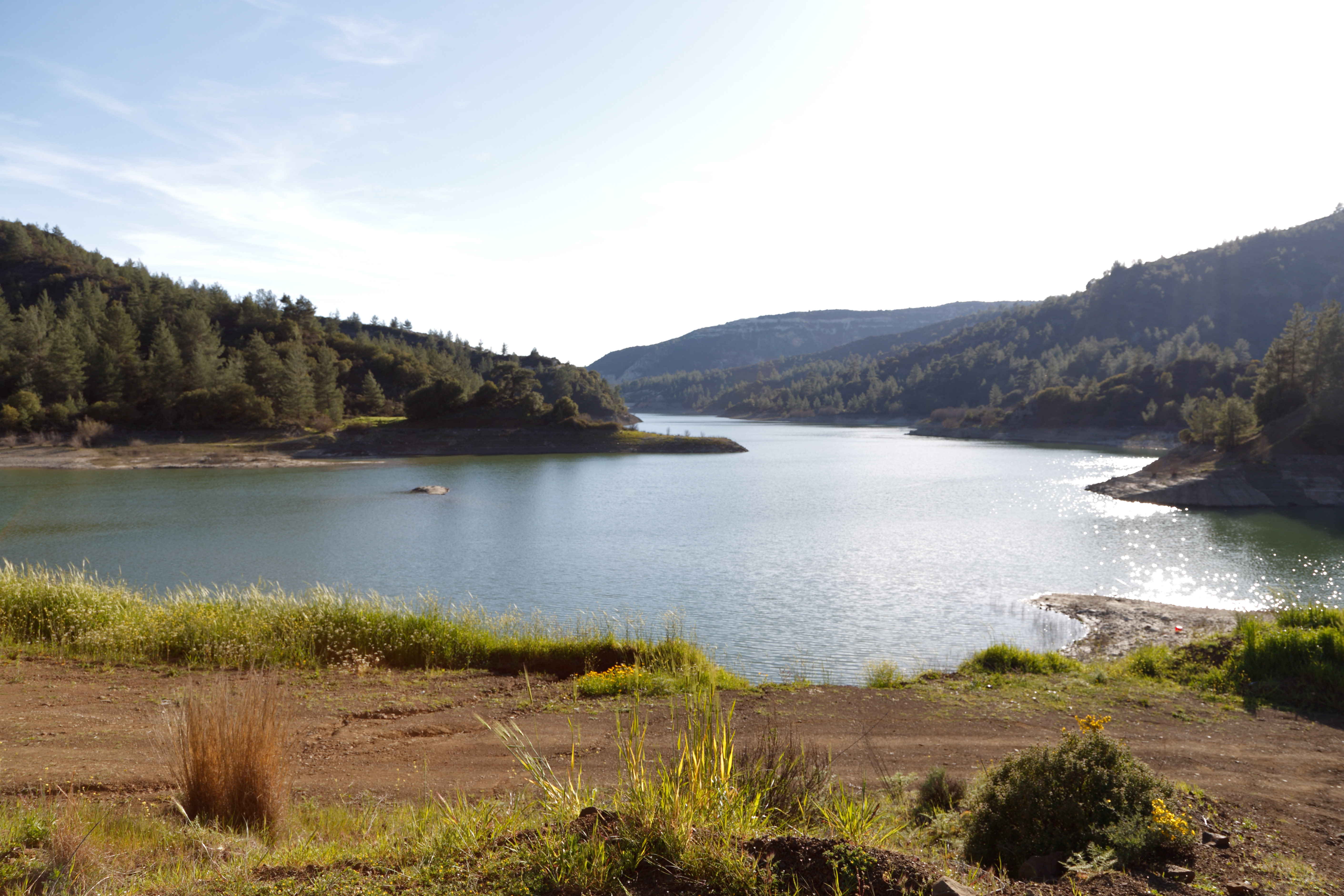 Arminou Reservoir, Cyprus